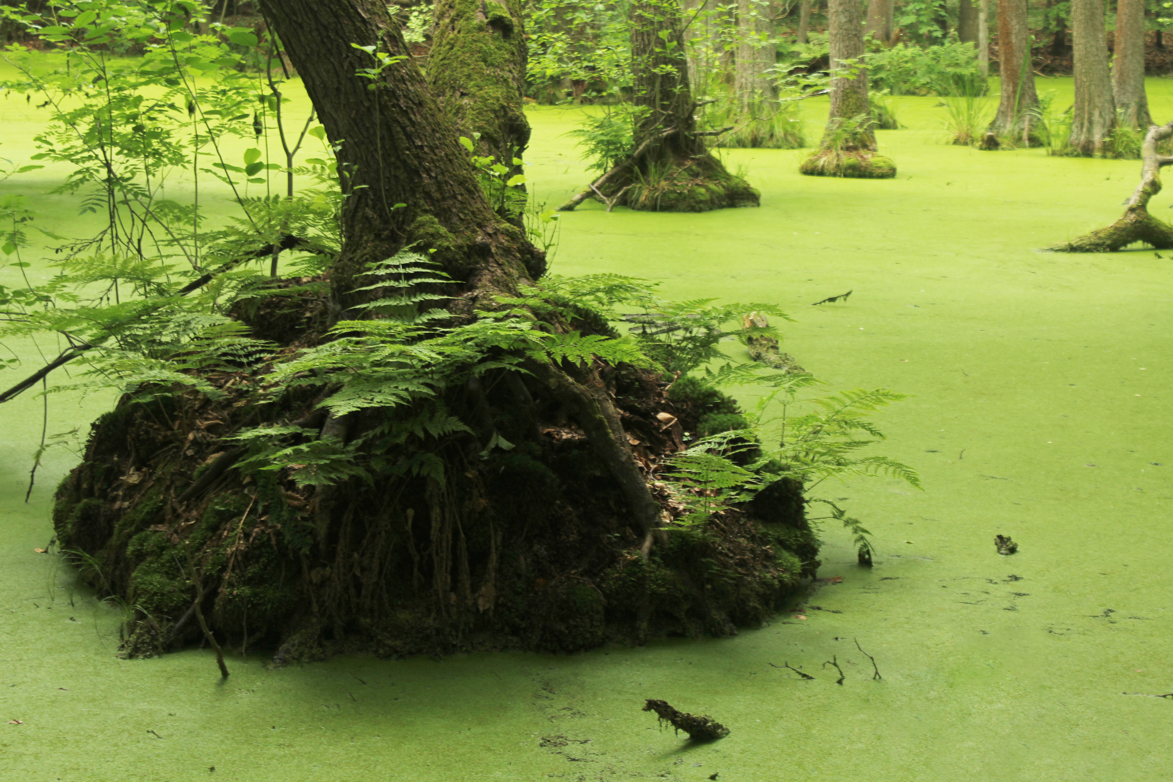 Bäume im Plagefenn-Moor - Naturschutzgebiet „Plagefenn“ im Biosphärenreservat Schorfheide-Chorin, Brandenburg